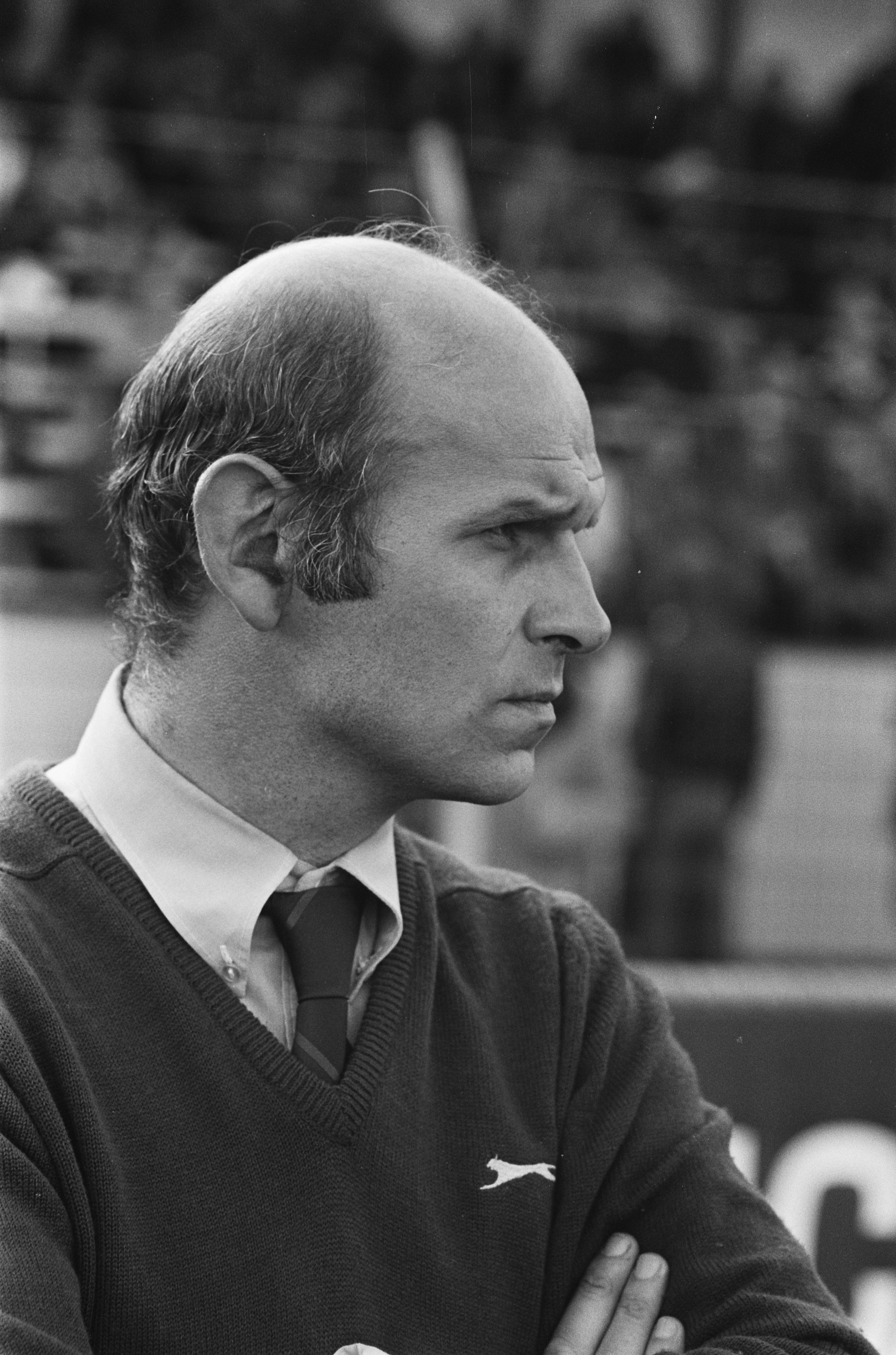 Collectie / Archief : Fotocollectie Anefo Reportage / Serie : [ onbekend ] Beschrijving : Haarlem tegen FC Amsterdam 3-1; Haarlem trainer Barry Hughes , kop Datum : 24 oktober 1976 Locatie : Haarlem Trefwoorden : sport, trainers, voetbal Persoonsnaam : Barry Hughes Instellingsnaam : FC Amsterdam Fotograaf : Croes, Rob C. / Anefo Auteursrechthebbende : Nationaal Archief Materiaalsoort : Negatief (zwart/wit) Nummer archiefinventaris : bekijk toegang 2.24.01.05 Bestanddeelnummer : 928-8456